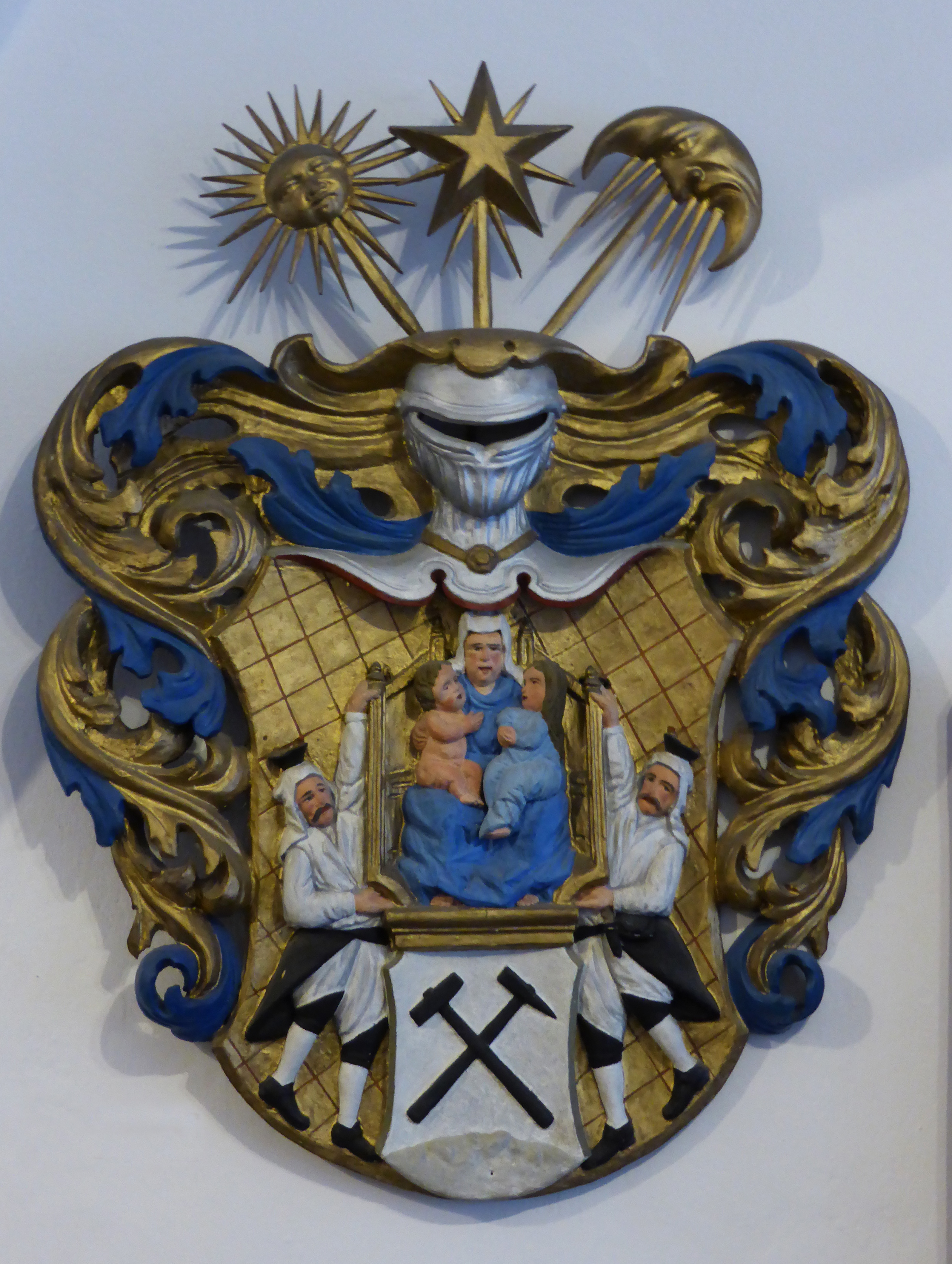 Stadtwappen von Annaberg - Erzgebirgskreis - Sachsen.